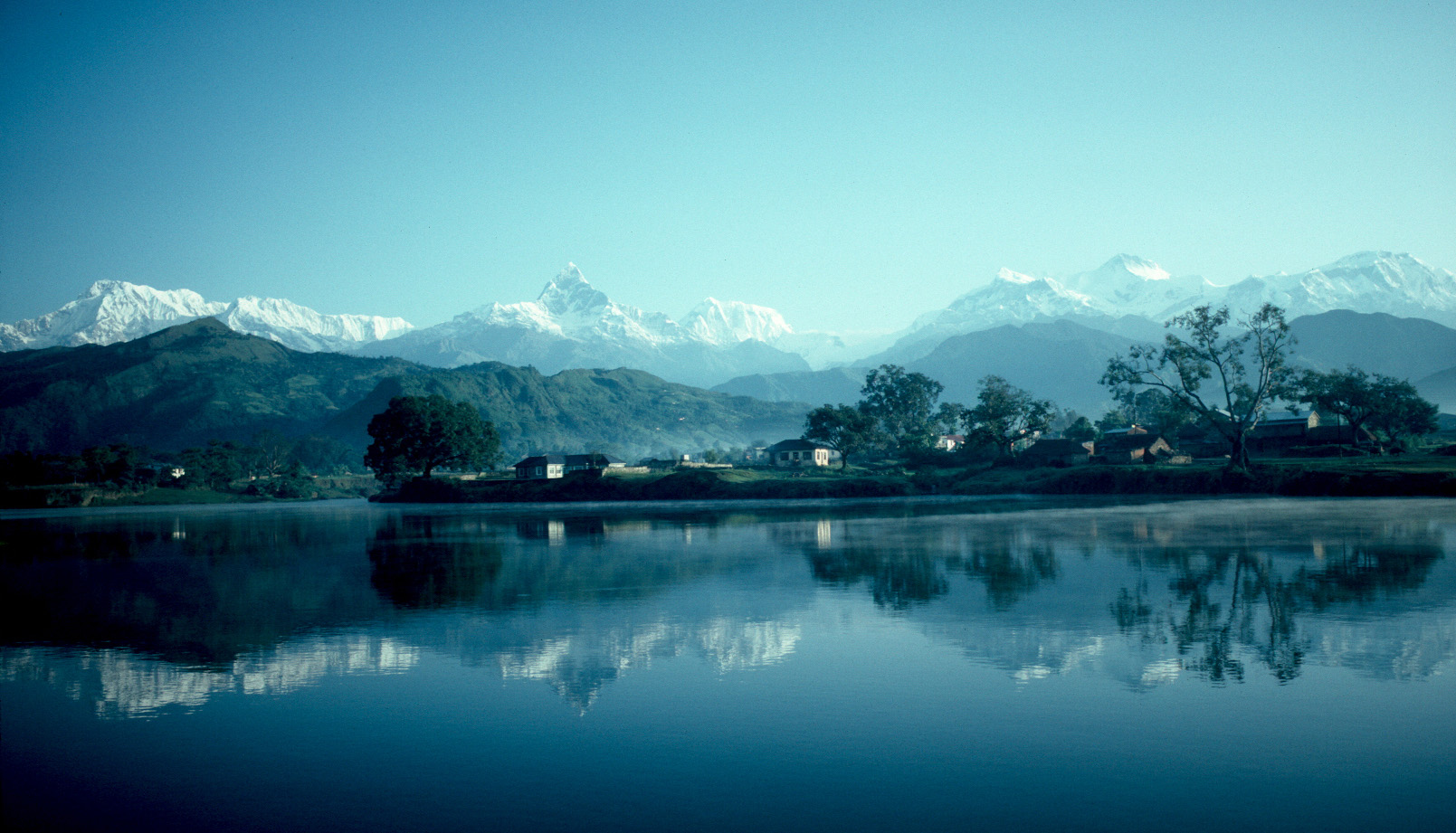 Pokhara (Nepal) am Phewa-See. Im Hintergrund v. l. n. r. Annapurna Süd, Annapurna I mit dem ebenfalls schneebedeckten Hiunchuli davor, Machapucharé (steile Spitze links der Bildmitte), Annapurna III (Bildmitte, im Hintergrund), Annapurna IV, Annapurna II und Lamjung Himal.